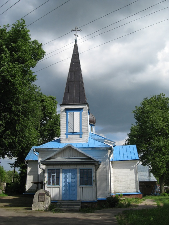 Косіна. Драўляная царква